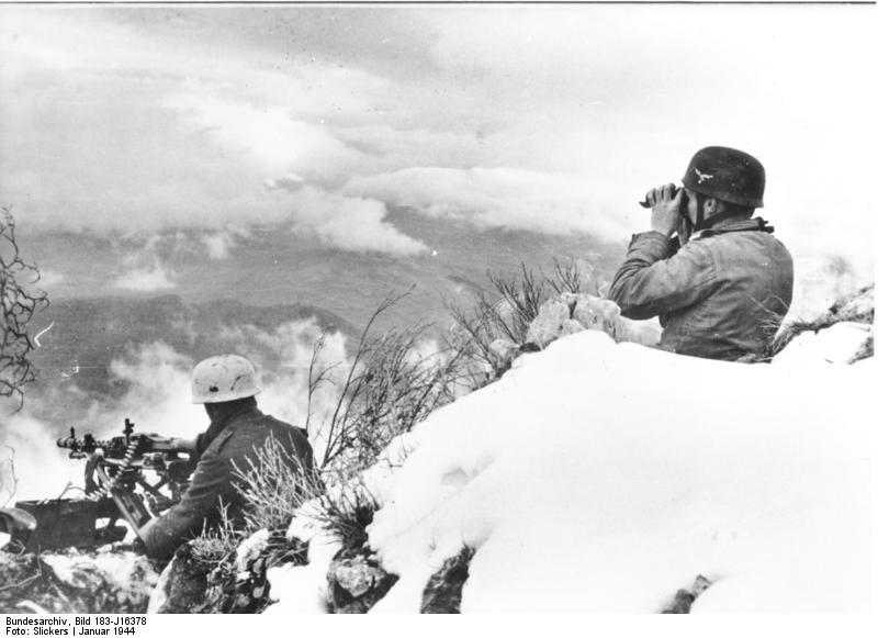 Südfront in Eis und Schnee In 2000 Metern Höhe in einer kleinen Mulde befinden sich die Stellungen unserer Fallschirmjäger, die hier einen harten Kampf nicht nur mit dem Feind, sondern auch mit den Unbilden der Witterung, zu führen haben. PK-Aufnahme Kriegsberichter Slickers 4.1.1944